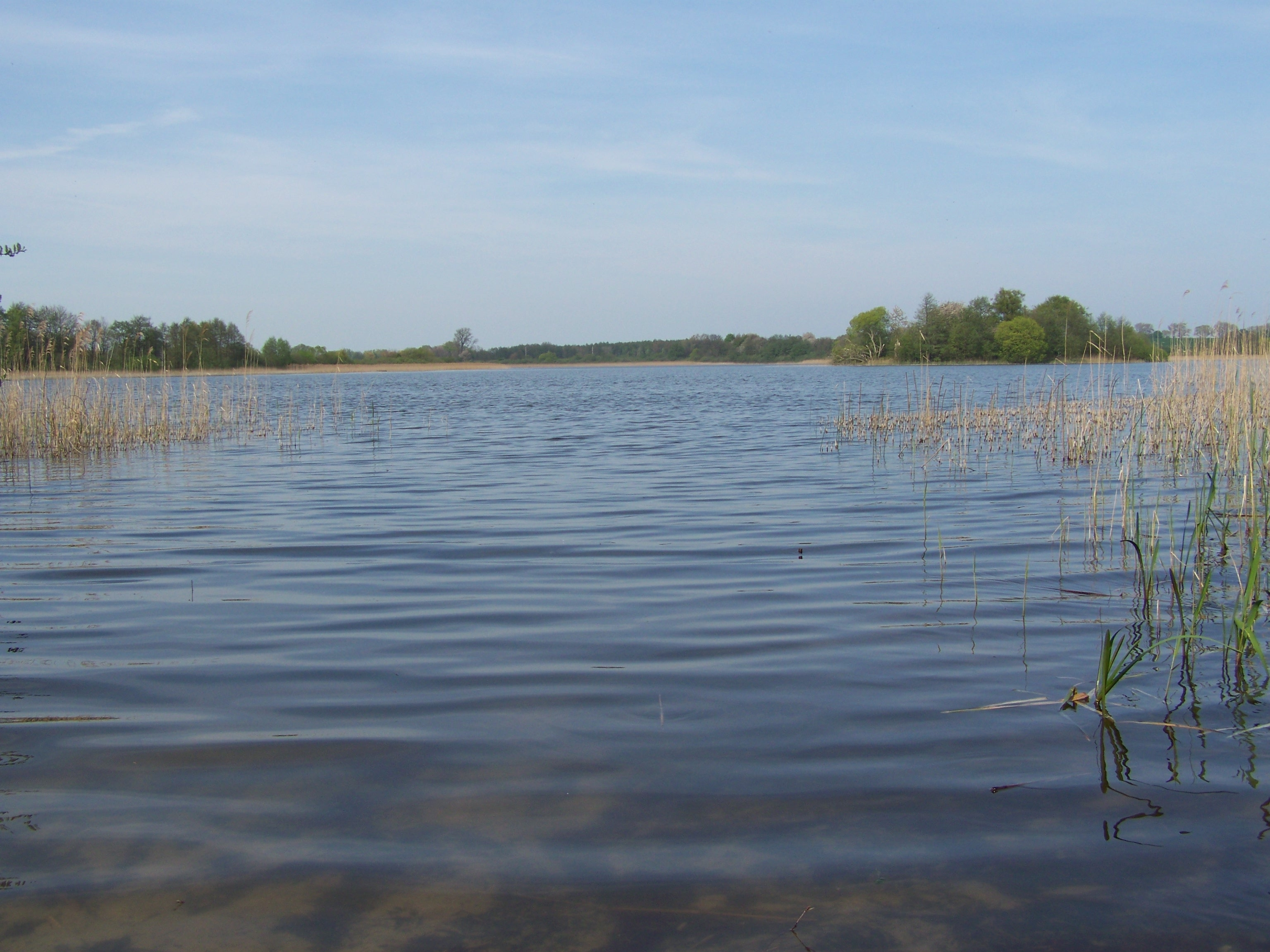 Pütter See in Mecklenburg-Vorpommern, Teil des Naturschutzgebiets „Borgwallsee und Pütter See“